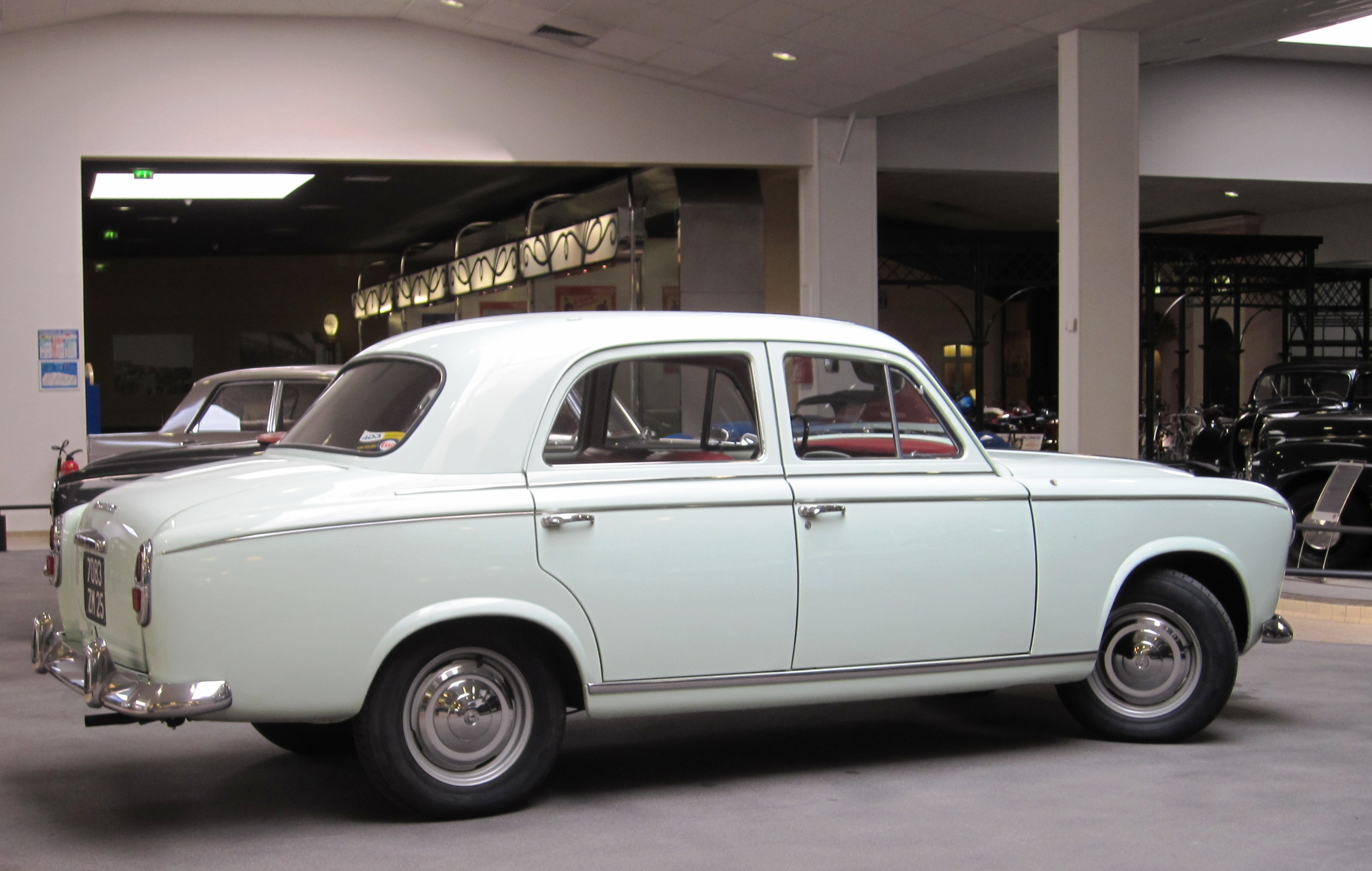 Peugeot 403 (Musée de l'Aventure Peugeot)